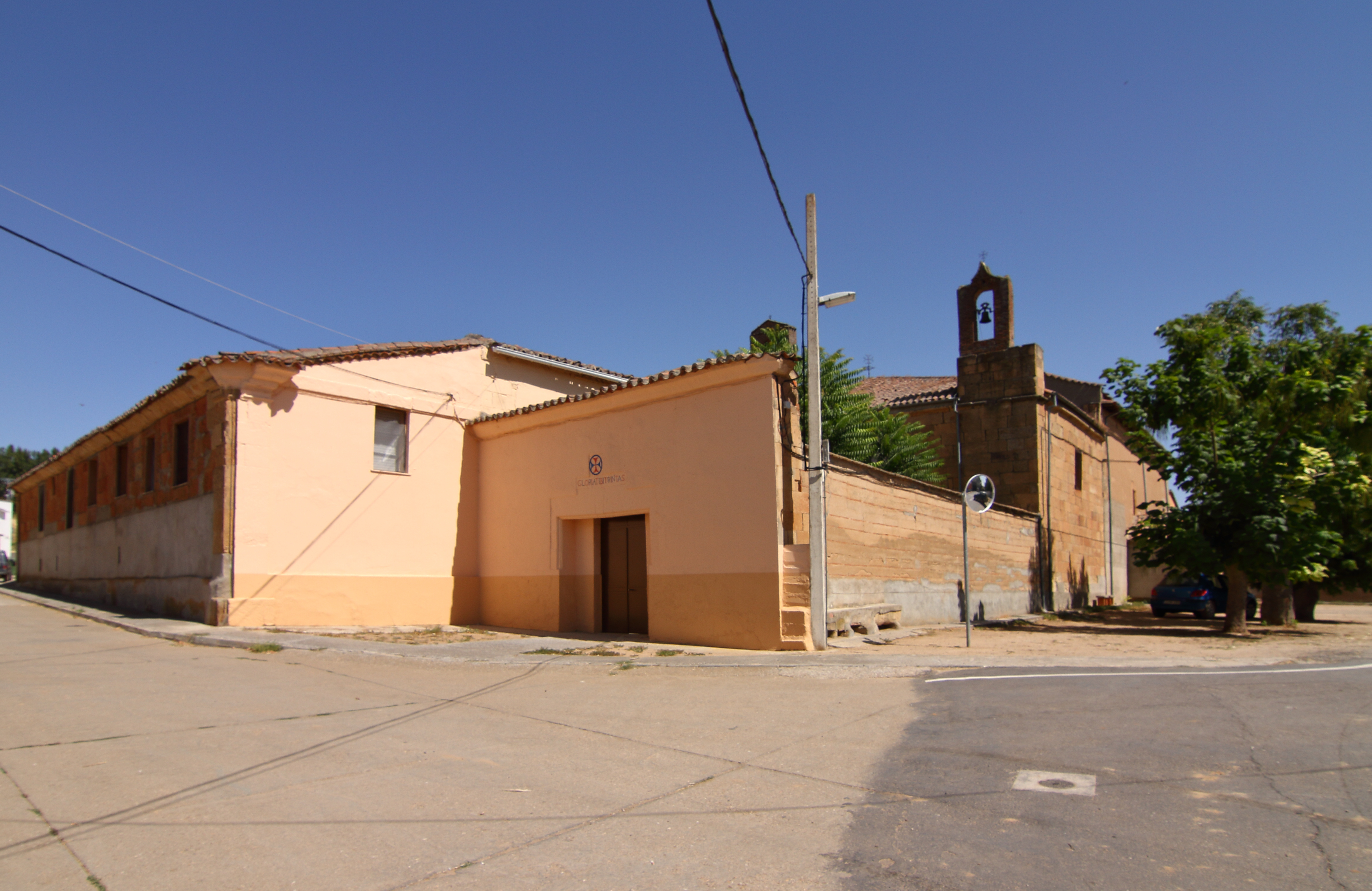 Monasterio de Santa Maria La Alta, Convento de monjas trinitarias